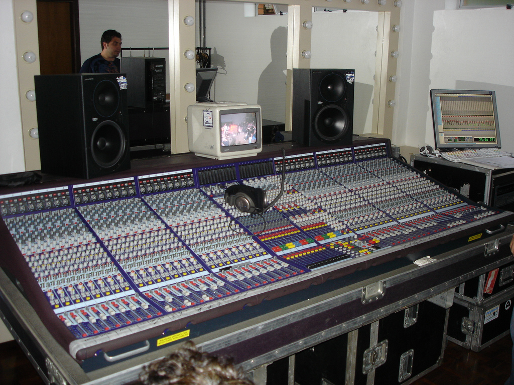 Técnica da gravação. Sob a responsa de Edu Coelho e Ricardo Vidal Midas Legend 3000 Mackie HR824